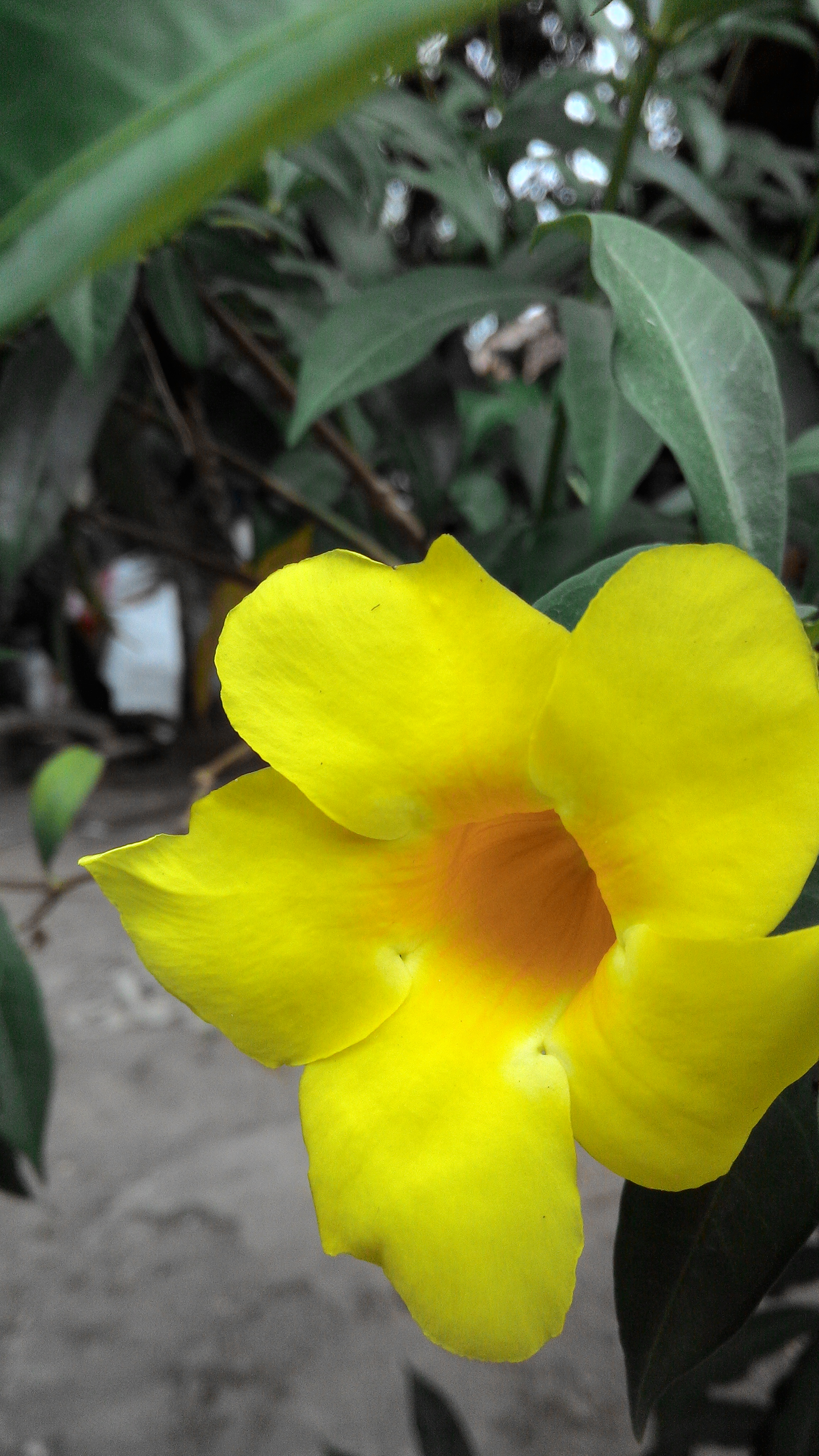 Allamanda yang sedang mekar